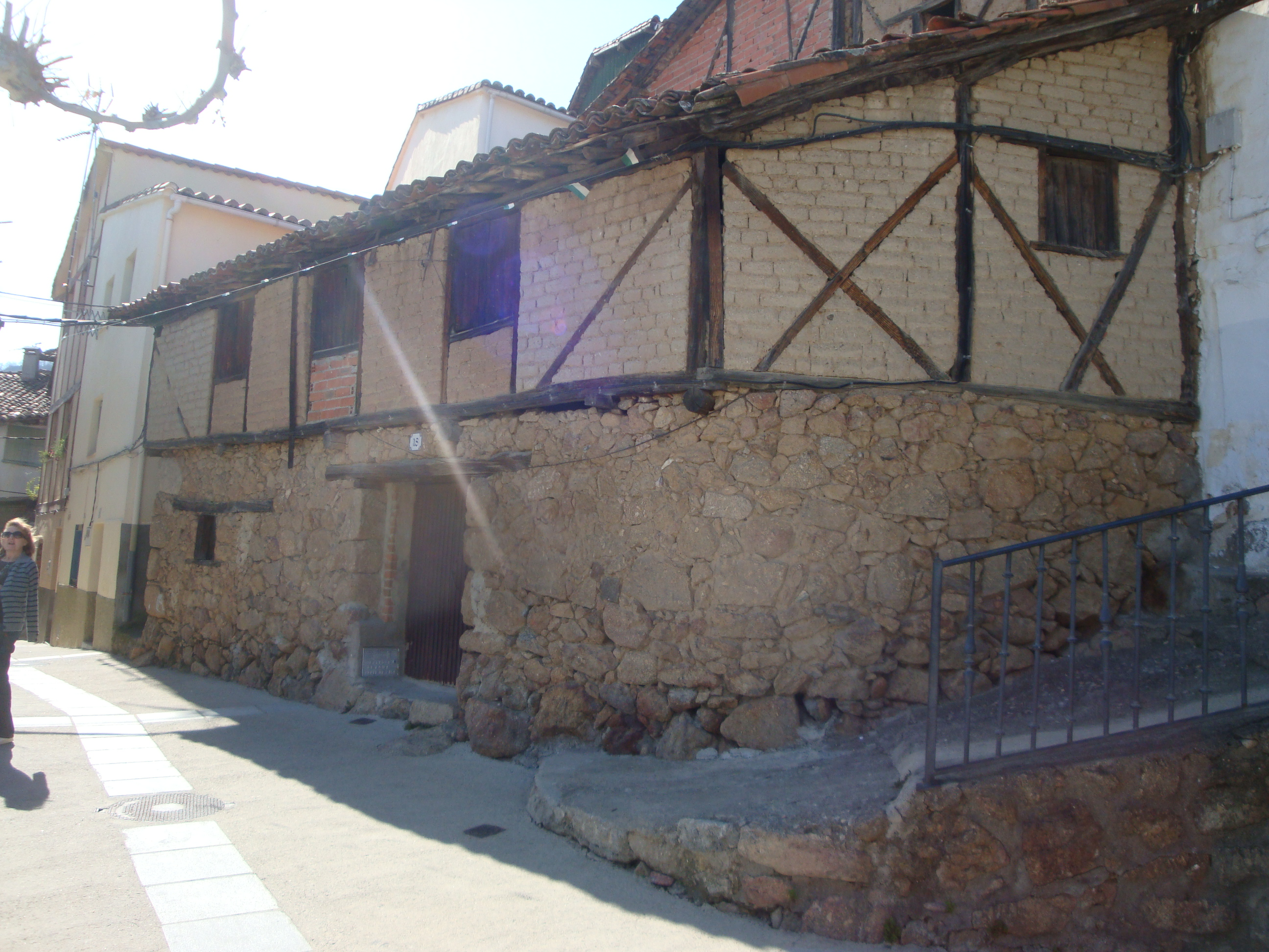 vivienda construida parcialmente de adobe en Rebollar (Caceres)